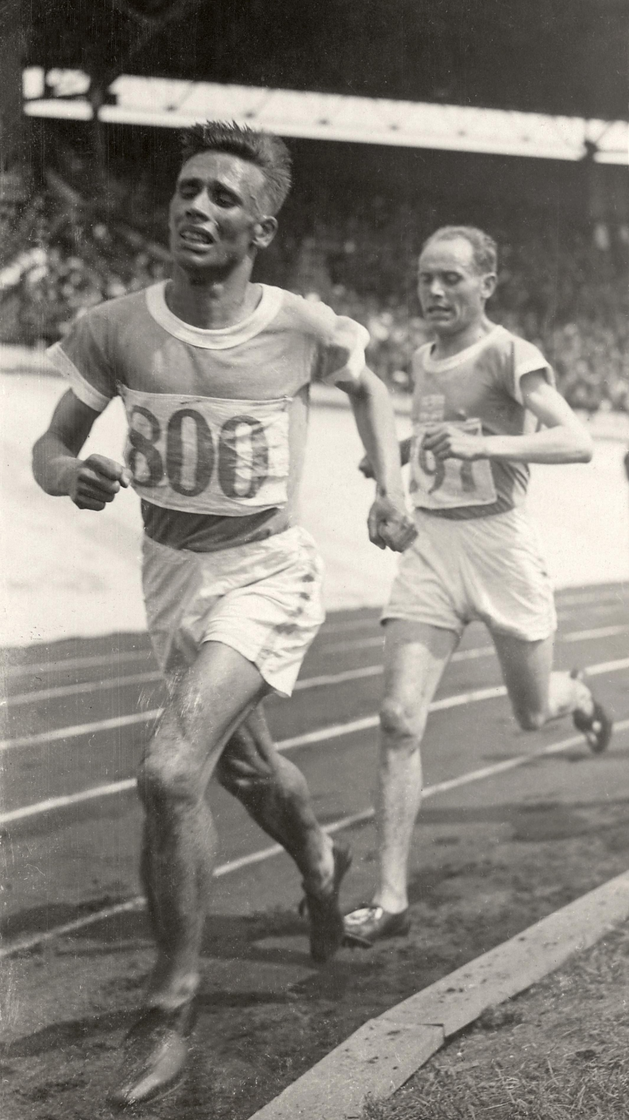 Sport. Olympische Spelen 1928 Amsterdam, Nederland : Opname uit de finale van de 10.000 meter hardlopen. Aan kop Ville Ritola, gevolgd door Paavo Nurmi, die het goud pakte.